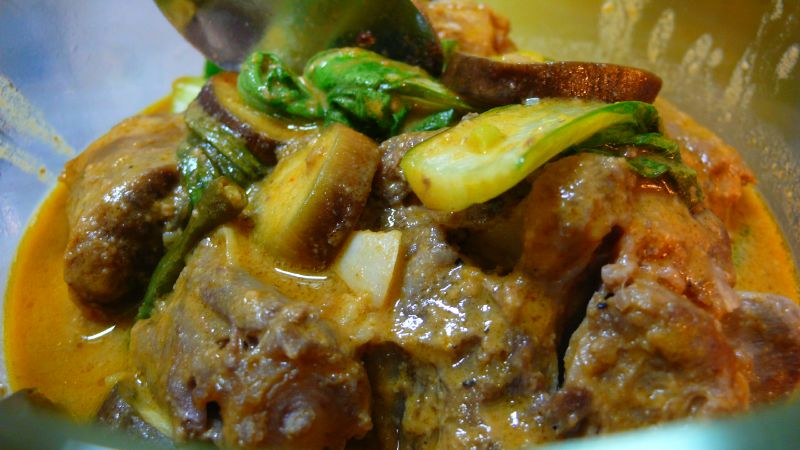 Beef oxtail in peanut sauce.